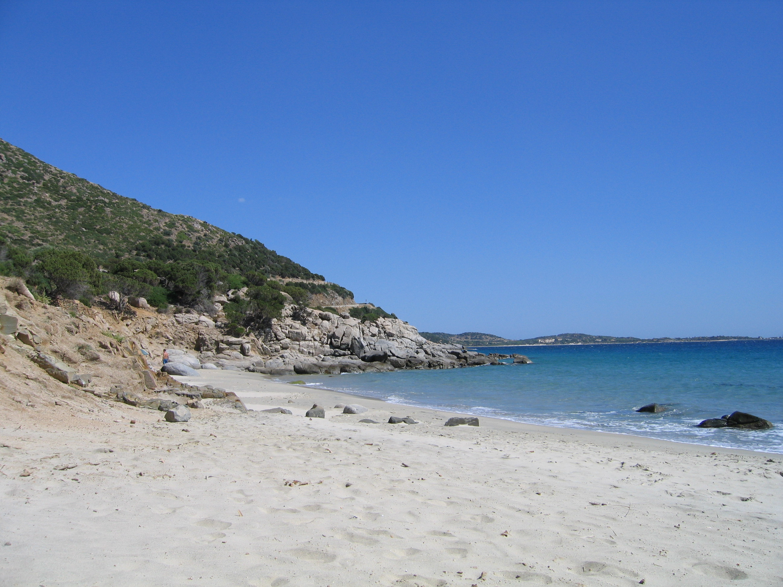 Spiaggia di Campu Longu - Villasimius (CA)